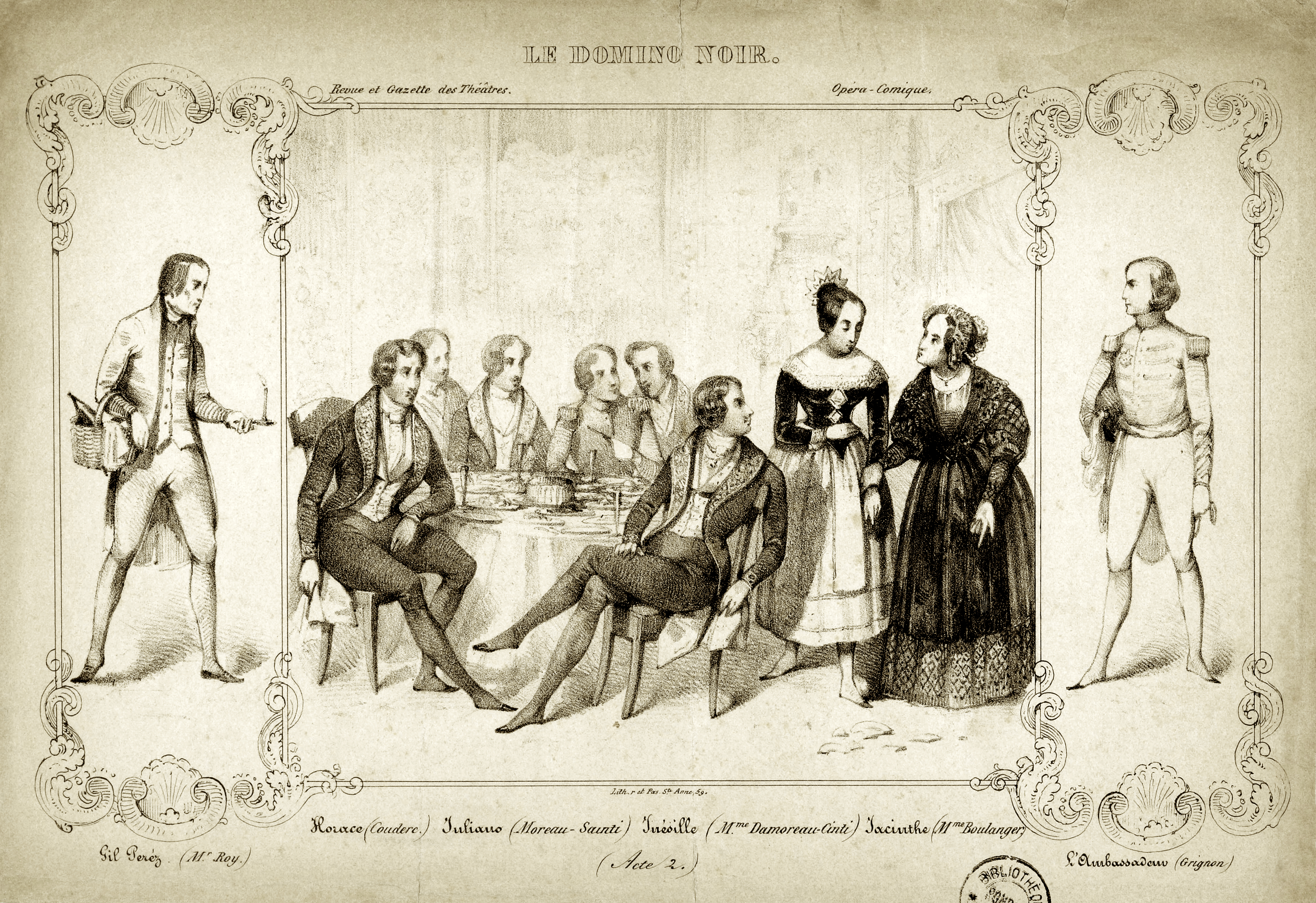 Acte 2 du Domino Noir de l'opéra-comique de Daniel-François-Esprit Auber, sur un livret d'Eugène Scribe. Des viveurs font le réveillon chez leur ami le comte Juliano. Angèle est déguisée en servante Aragonaise. A gauche, Gil Perez. A droite, Lord Elfort.